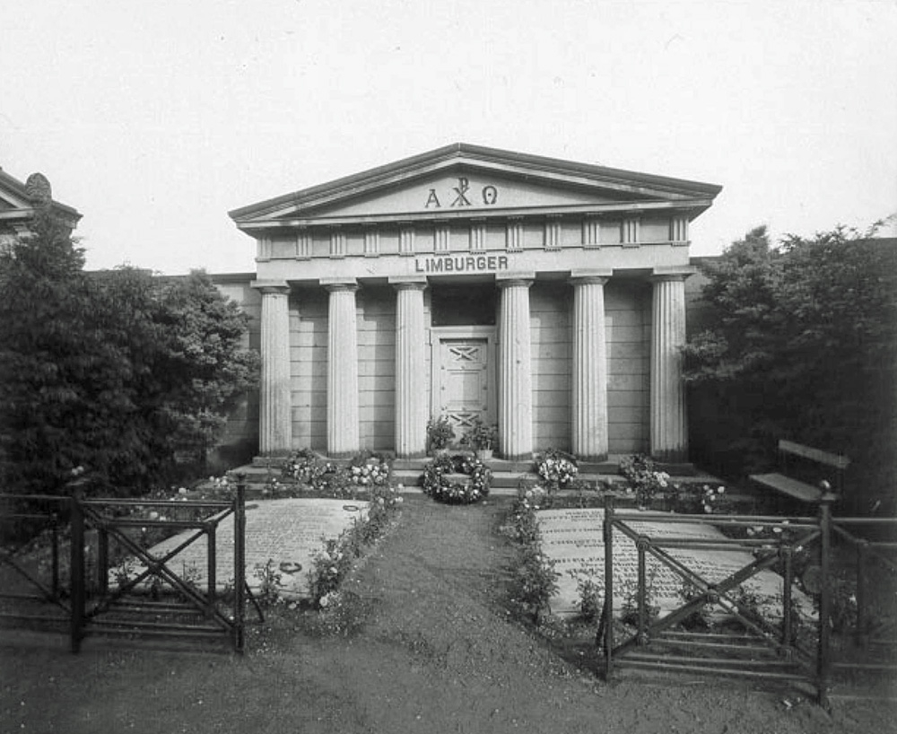 Grabanlage der Familie von Limburger auf dem Neuen Johannisfriedhof in Leipzig